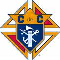 Escudo de los Caballeros de Colón, organización católica inciada en EE.UU. por Michael Joseph Mc Givney, sacerdote de origen irlandés